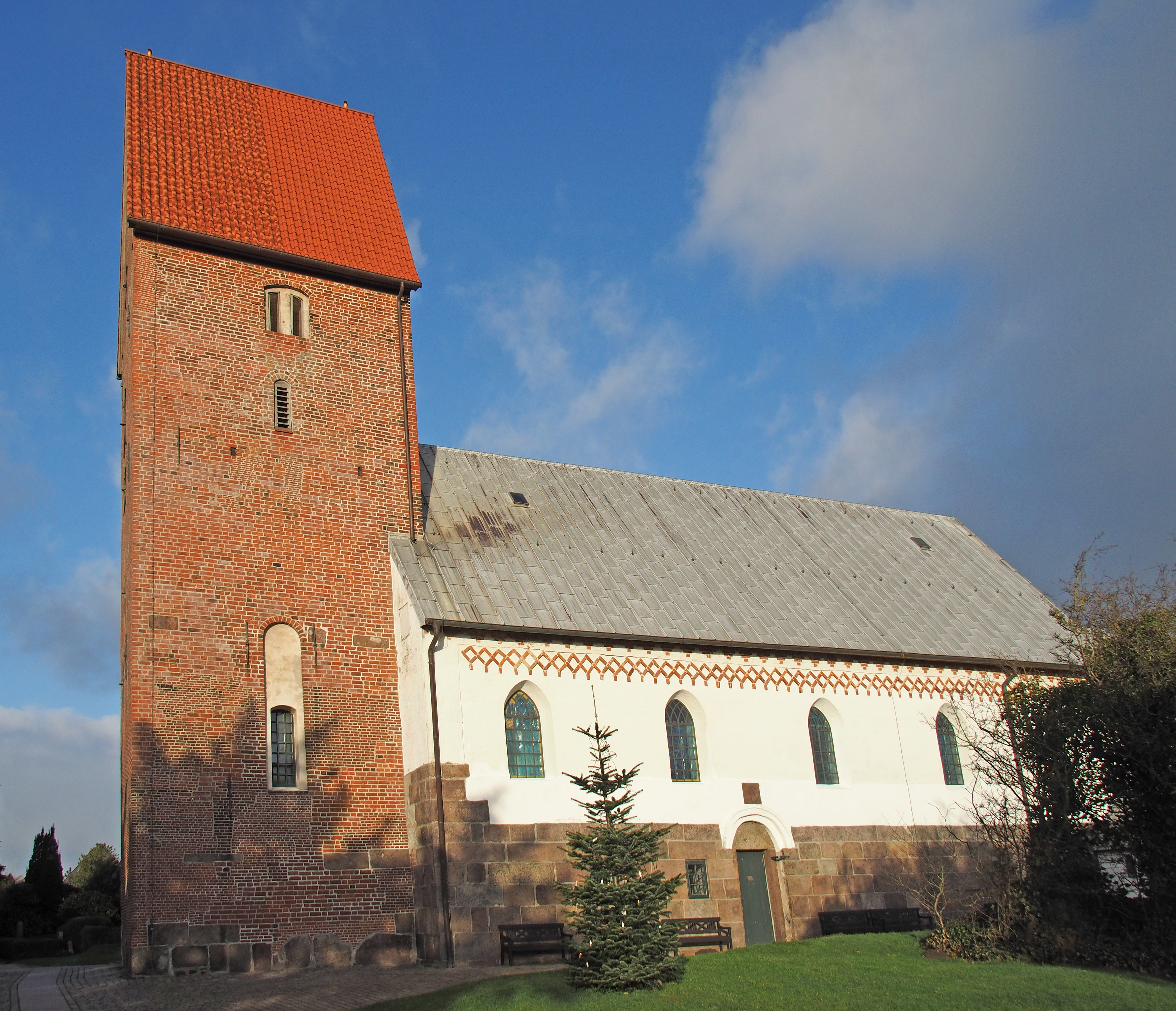 Turm und Langhaus der Dorfkirche St. Severin in Keitum auf Sylt